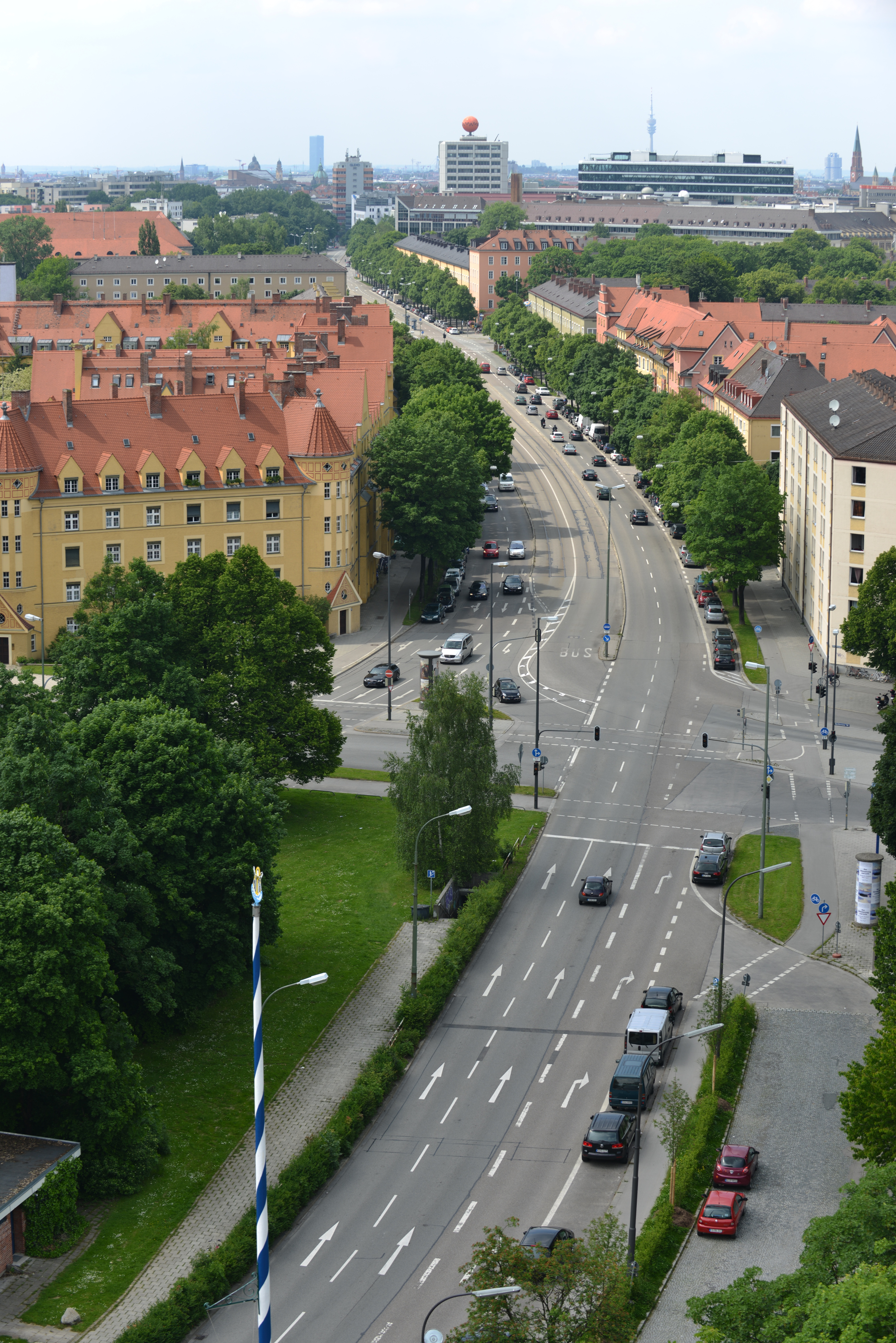 München. Blick von Ramersdorf auf die Rosenheimer Straße gen Innenstadt.